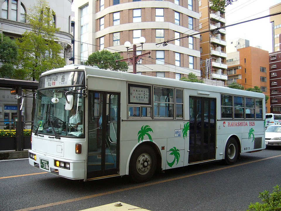 林田バス 一般路線バス 鹿児島市朝日通電停付近にて